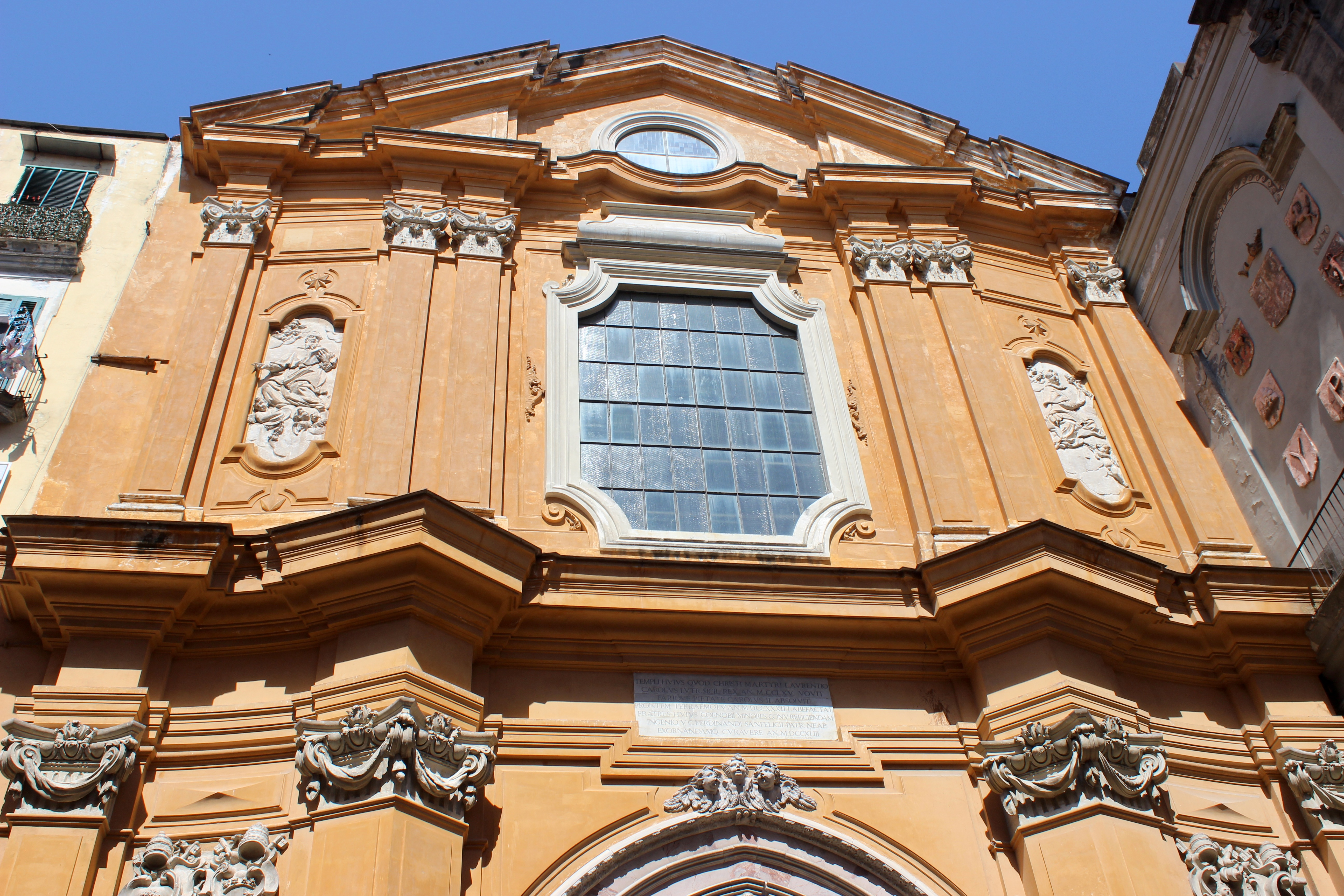 Nápoles. San Lorenzo Maggiore. Fachada.